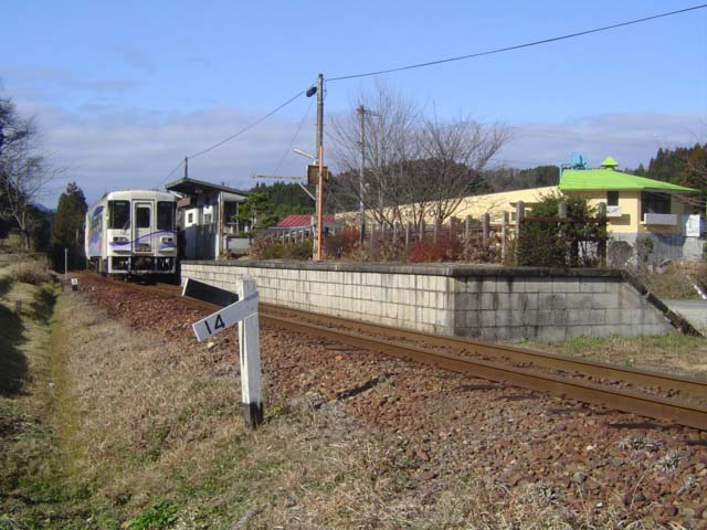 明知鉄道花白駅 投稿者が撮影（2004年12月22日）